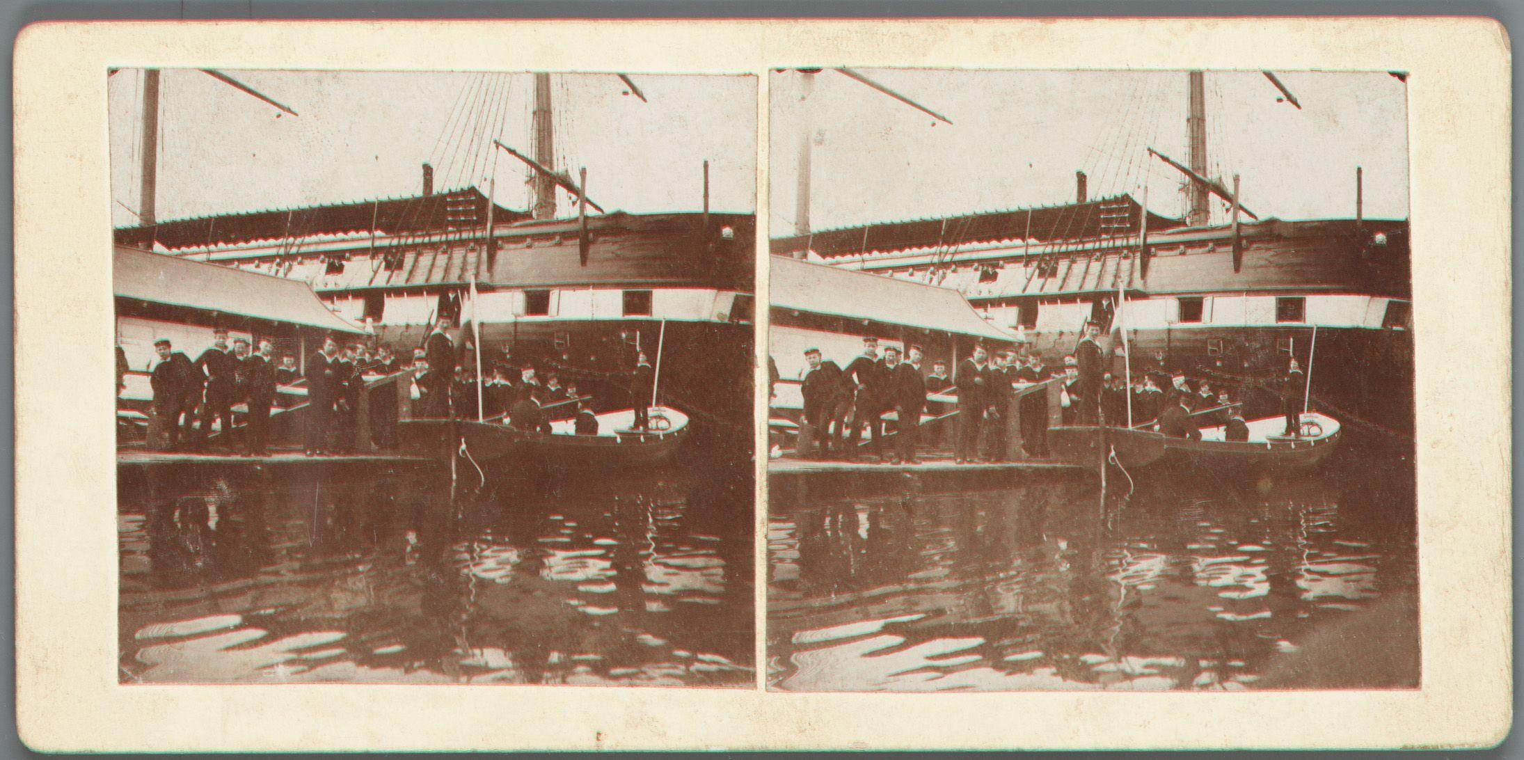 Beschrijving Amsterdam bij het opleidingschip de Wassenaar Opleidingsschip de "Admiraal van Wassenaar" van de Koninklijke Nederlandse Marine, gelegen in het Oosterdok bij het Marine-Etablissement aan het Mariniersplein (voormalig). (wijk 21) Documenttype foto Vervaardiger Benschop, Maarten Collectie Collectie Stadsarchief Amsterdam: stereofoto's Datering 1898 ca. t/m 1910 ca. Geografische naam Mariniersplein Oosterdok Inventarissen Afbeeldingsbestand 010007001391 Generated with Dememorixer